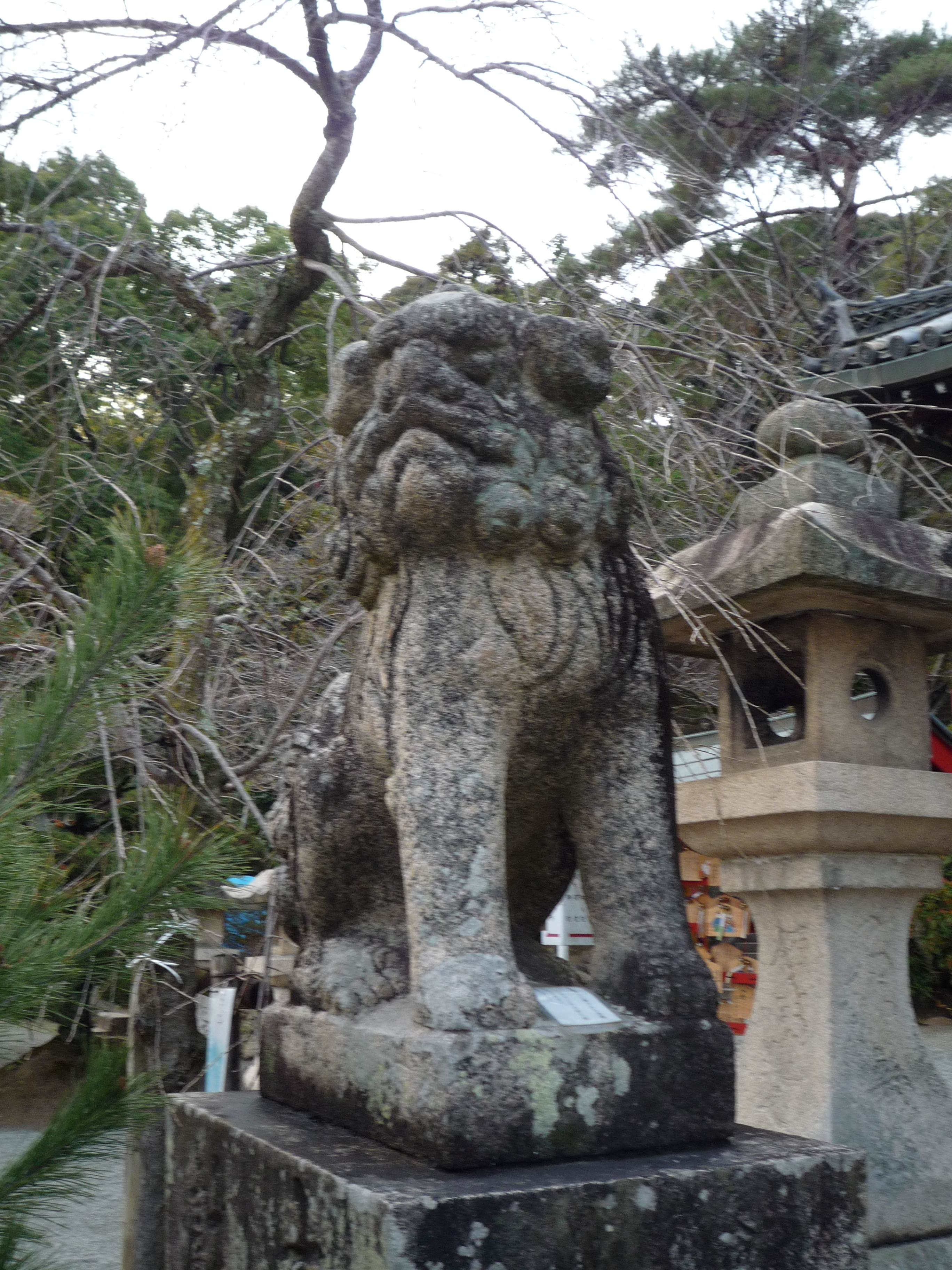 豊中春日神社の狛犬